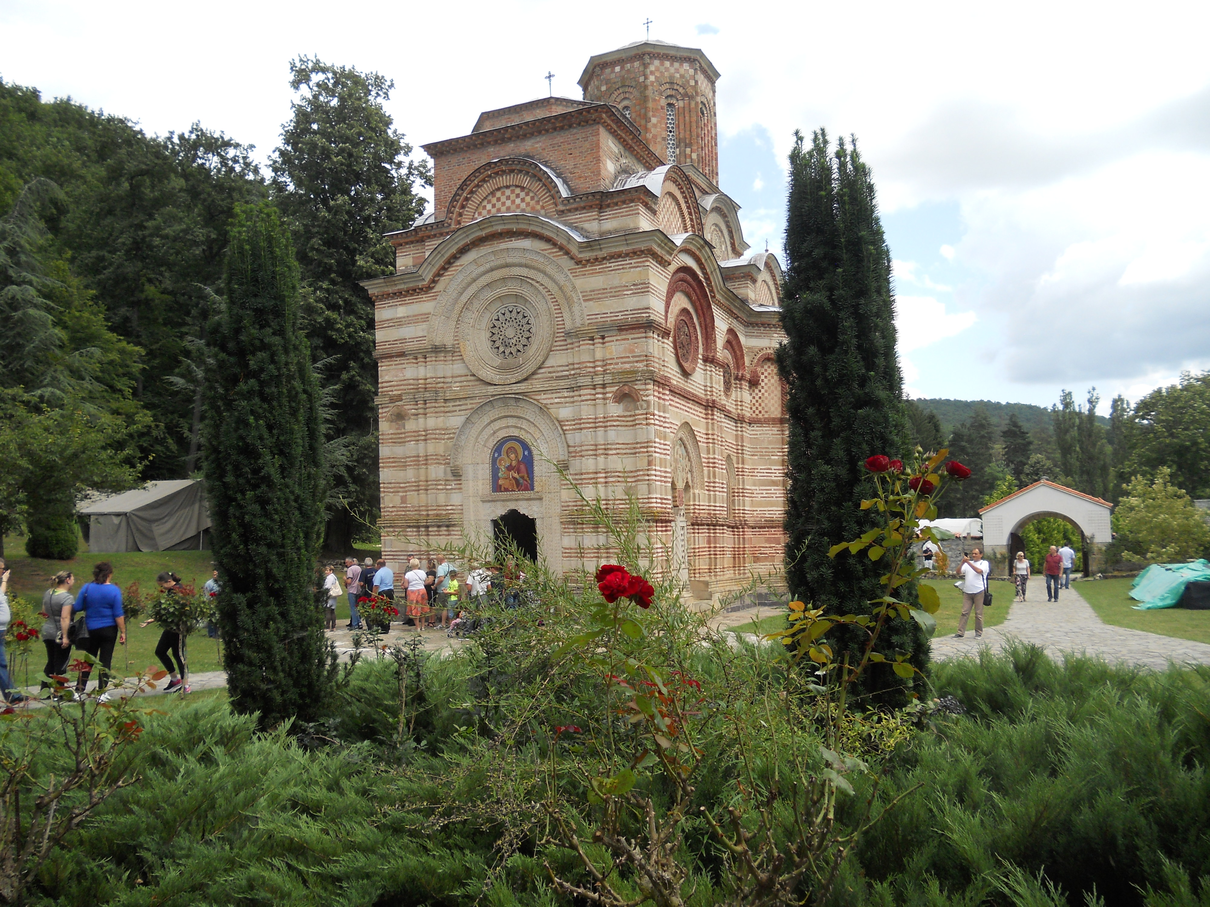 Kalenić Monastery